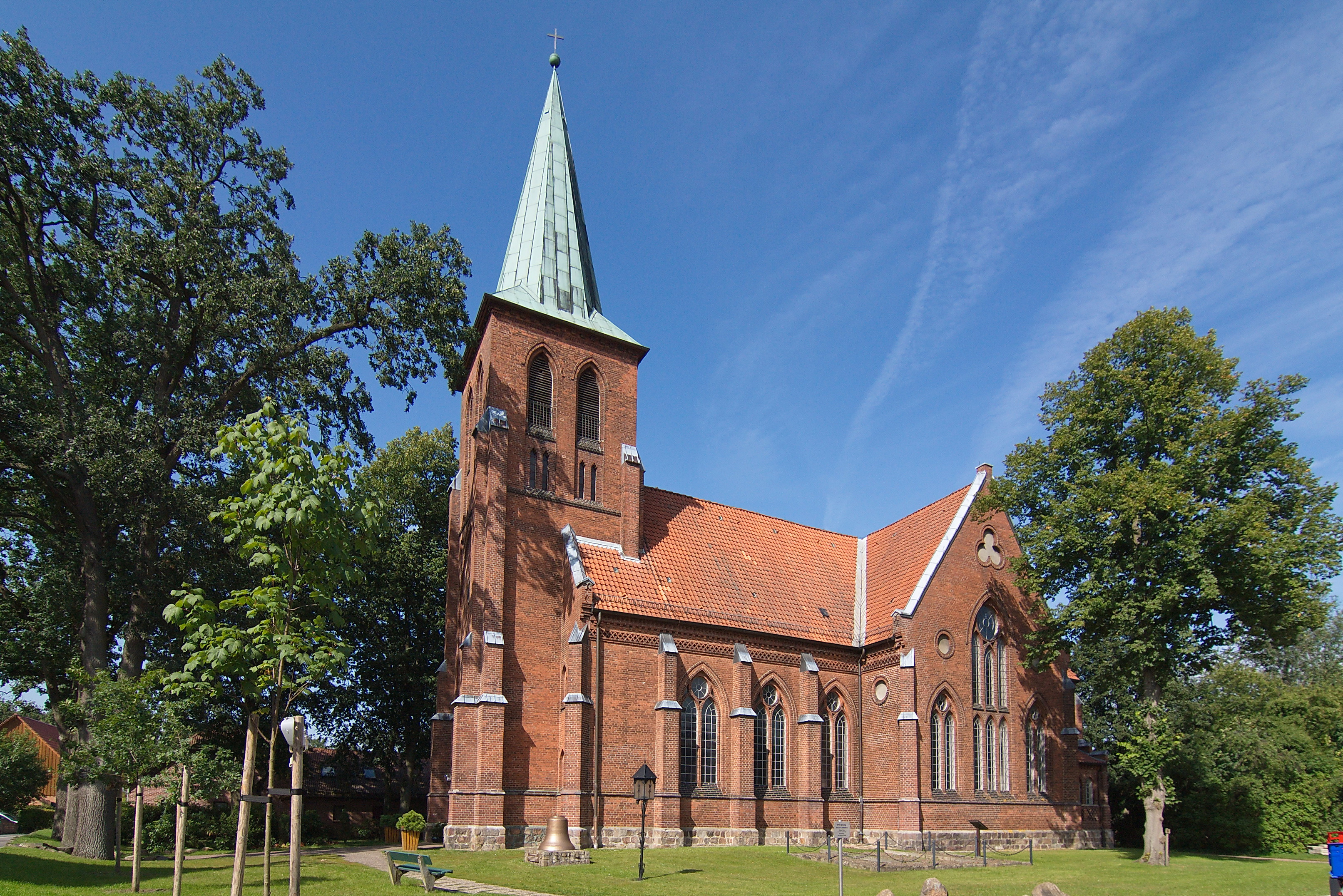 Friedenskirche (Groß Oesingen) in Niedersachsen, Deutschland